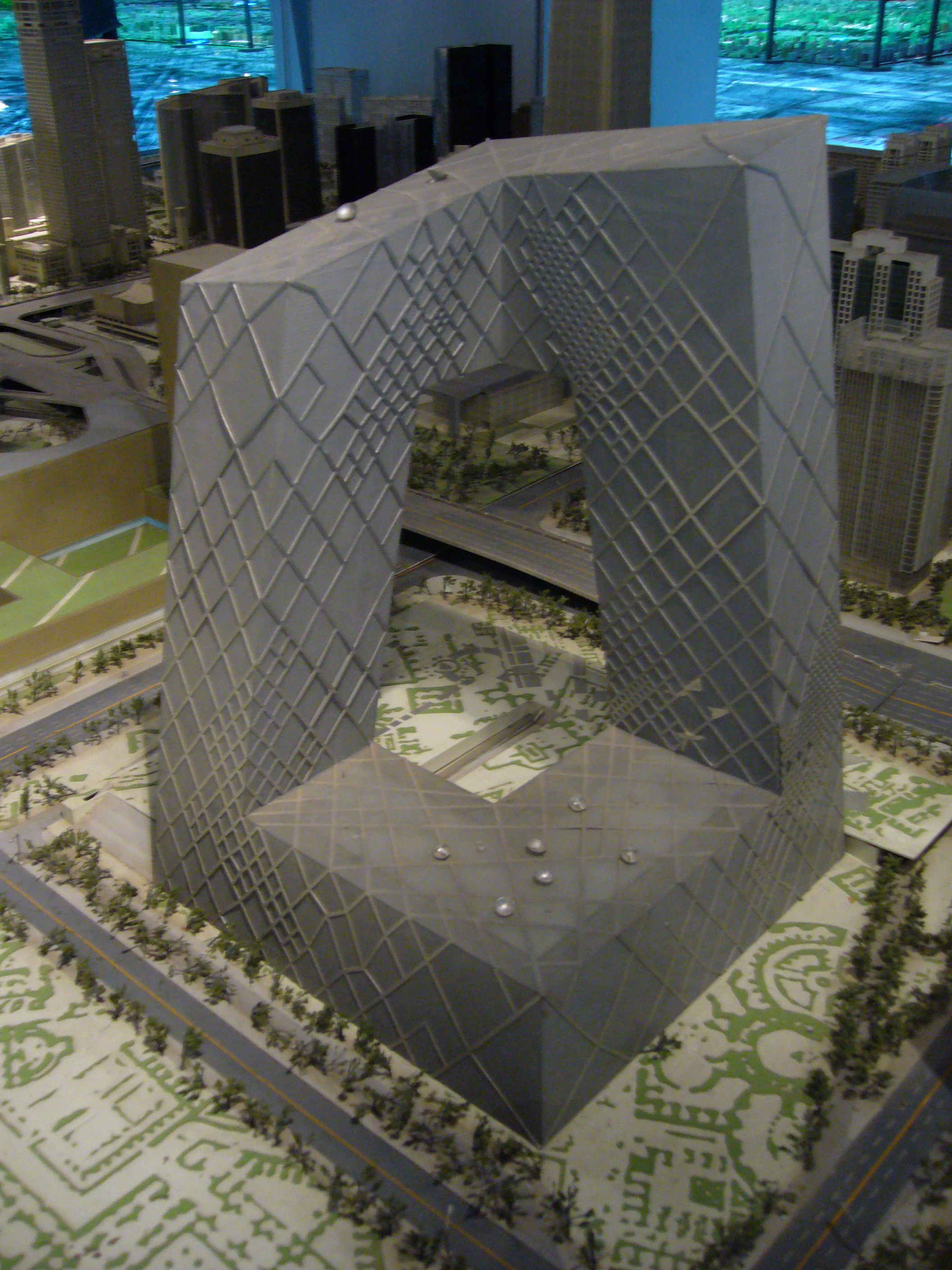 Rem Koolhaas, gebouw Chinese Staats TV in peking